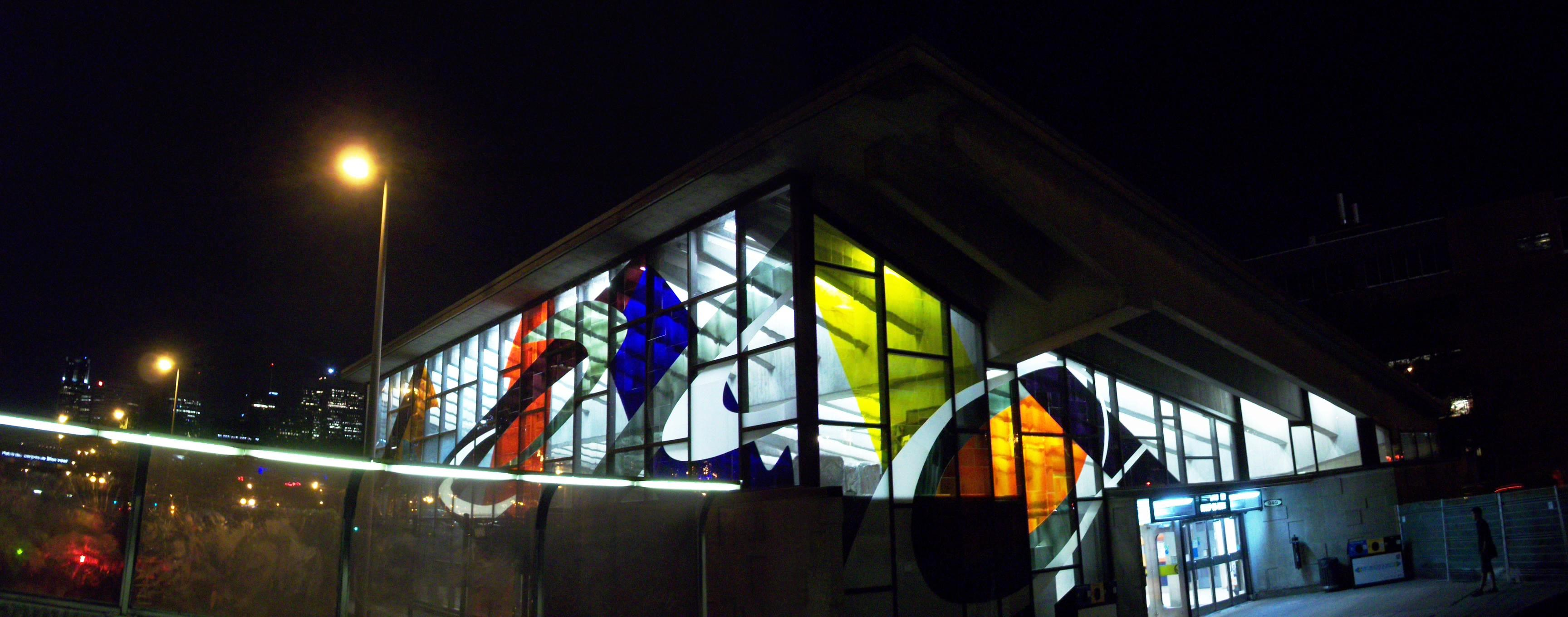 Édicule de la station de métro Champ-de-Mars, Montréal, la nuit. La verrière est l'oeuvre de Marcelle Ferron.